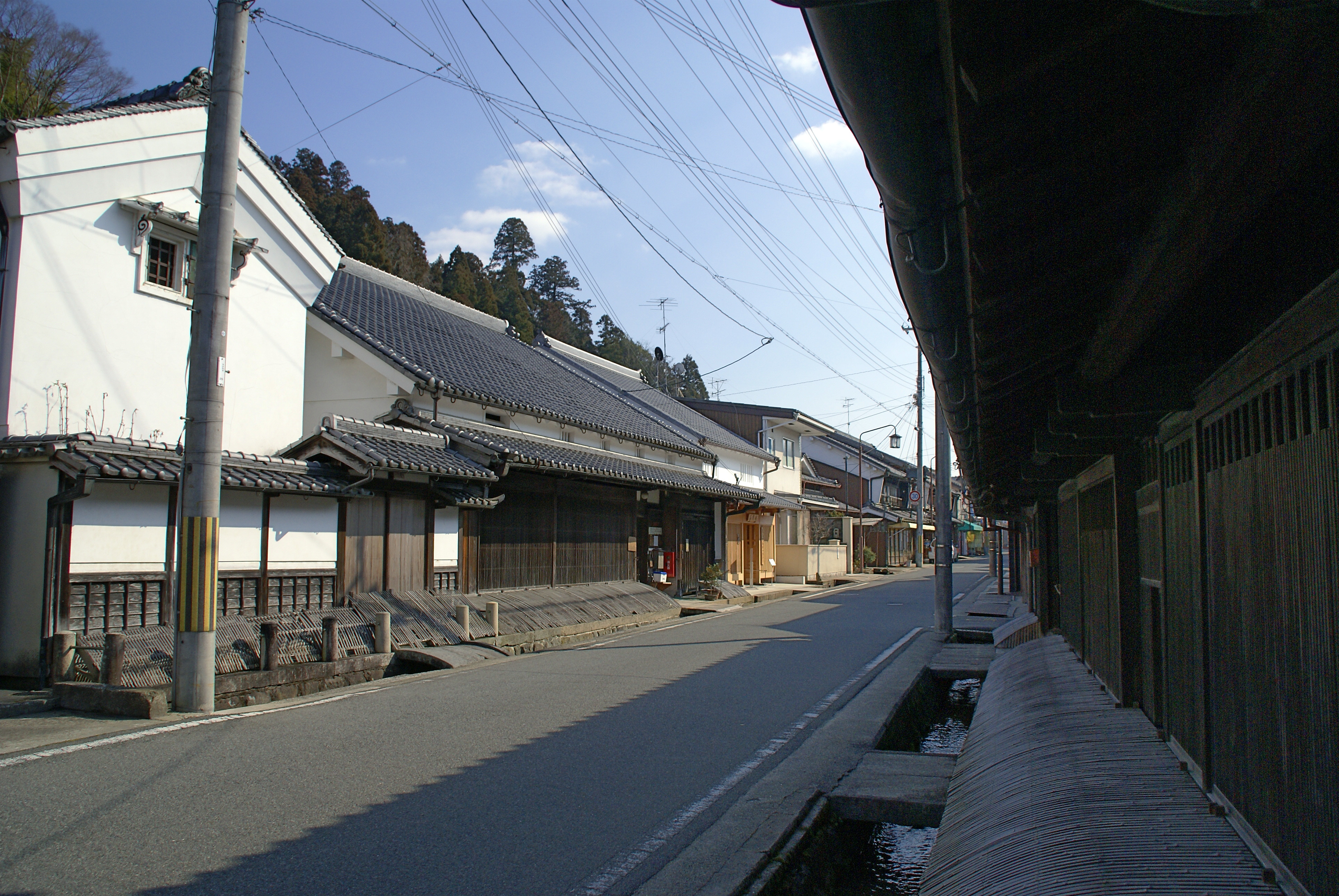 Matsuyama in Uda, Nara prefecture, Japan